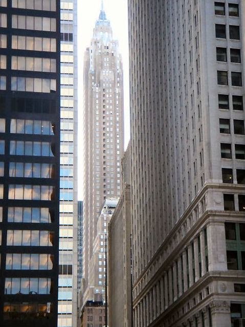 Une vue typique du Financial District dans le Lower Manhattan, New York, NY Photographie prise par Utilisateur:Nikk0 le 21 mai 2005